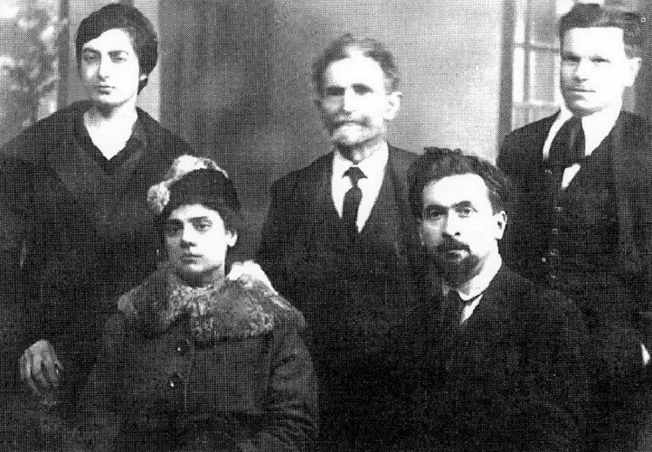 In piedi: Adalgisa Romagnoli, Errico Malatesta e Clodoveo Bonazzi. Seduti: Virgilia D'Andrea e Armando Borghi.